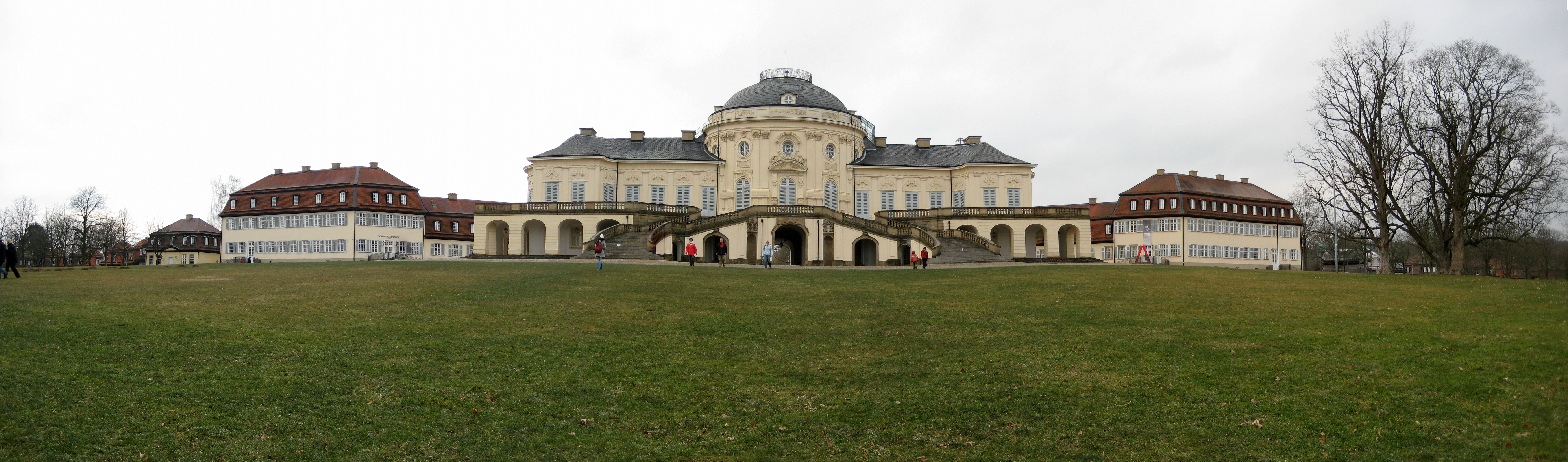 Schloss Solitude in Stuttgart, aufgenommen im Winter 2007